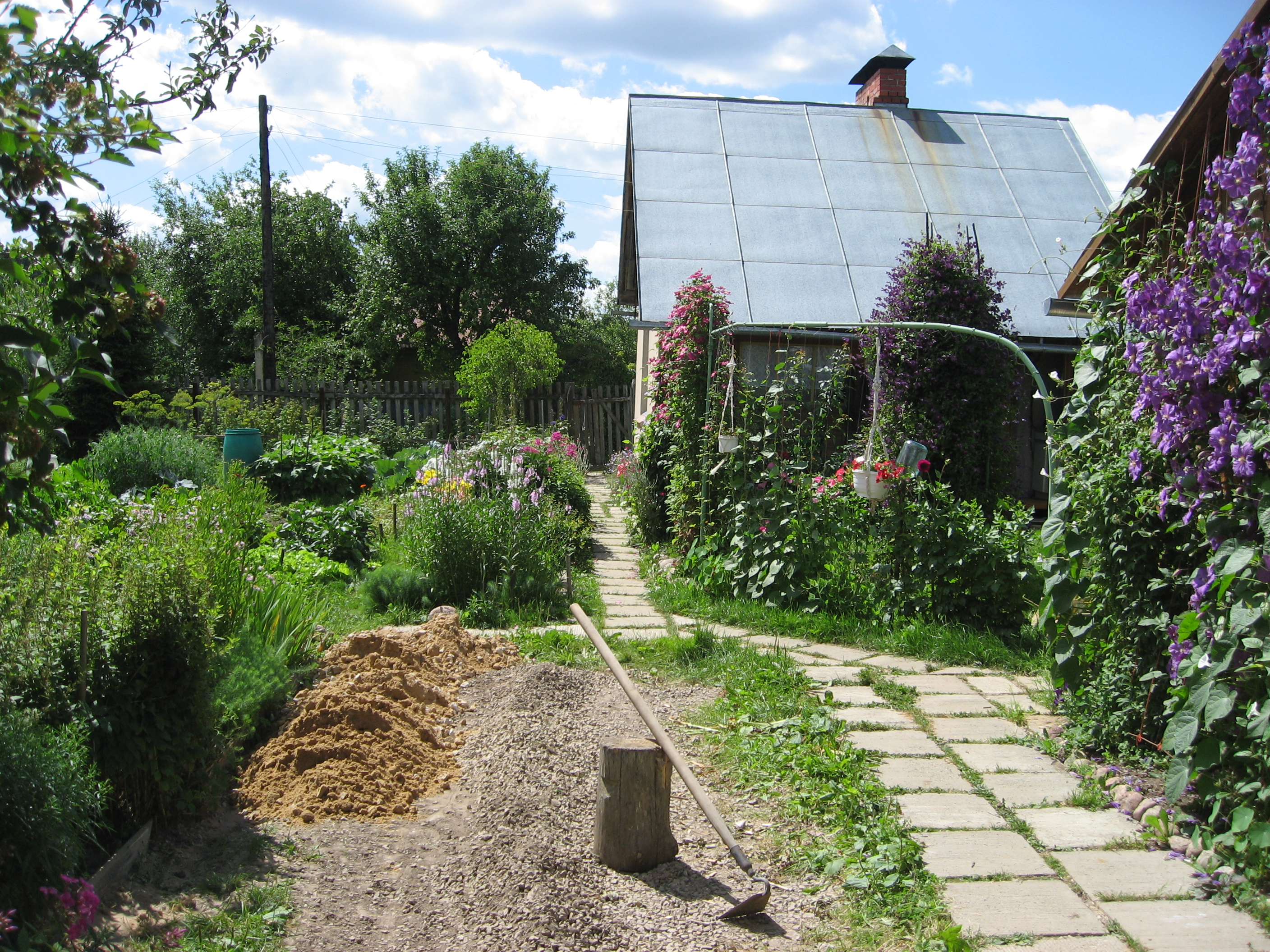 dacha // Где-то ещё в черте Калуги, но далеко за Окой